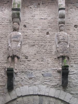 Bäckerjungen am Rheintor zu Andernach